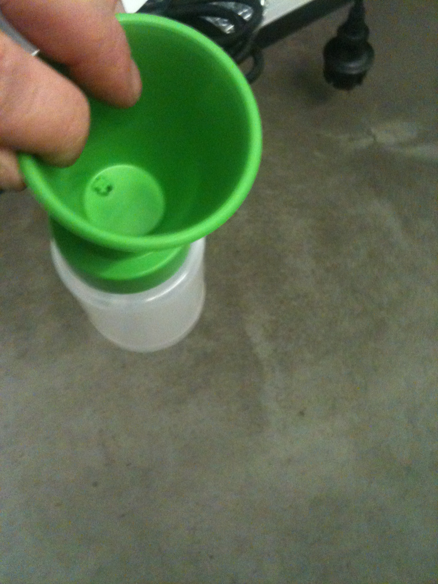 Dippbecher von oben aus gesehen